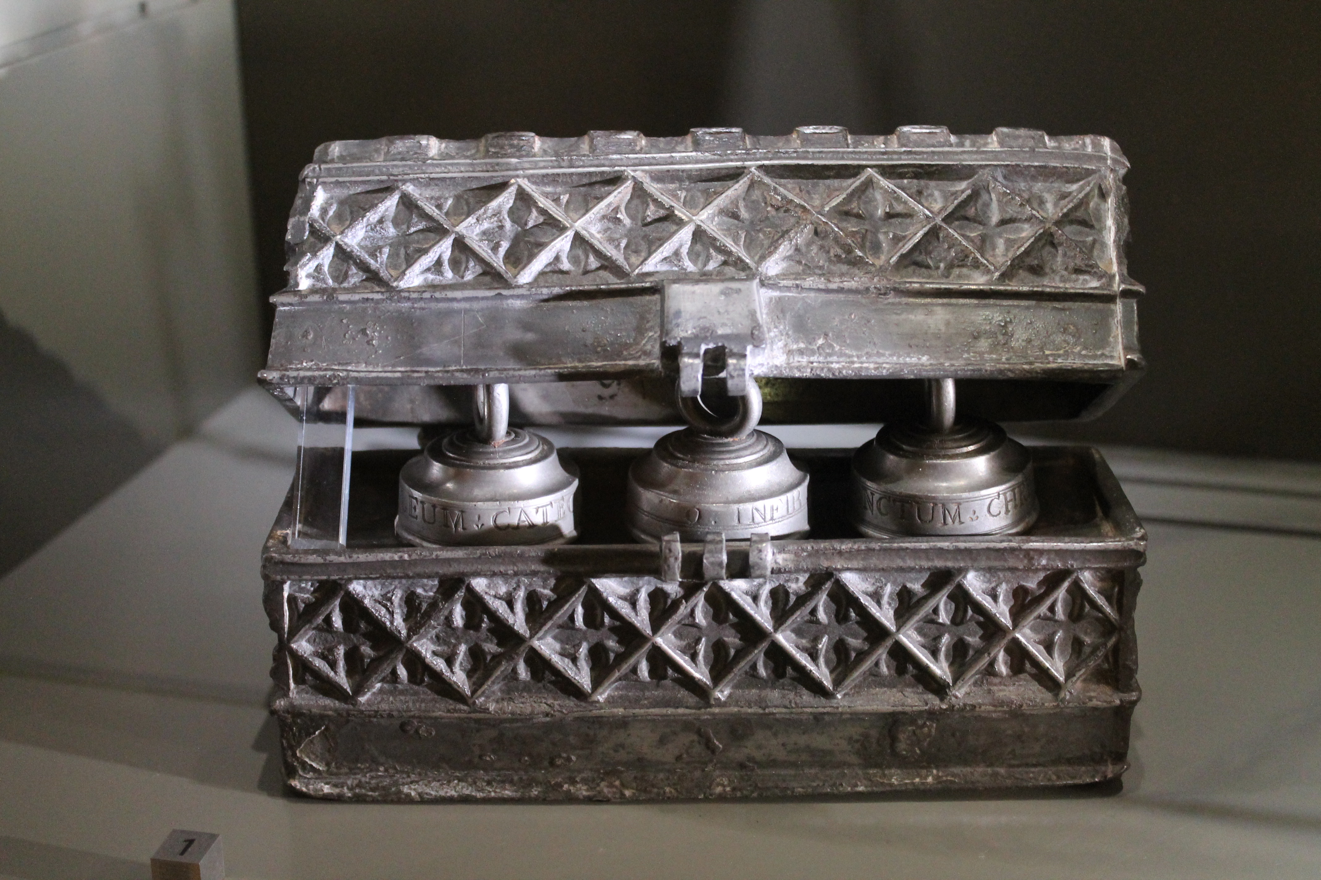 Pièce exposée au musée de Mayenne.